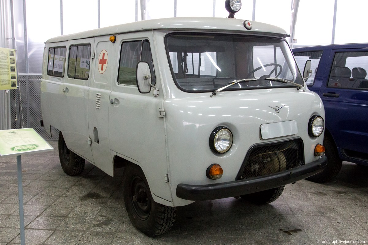 УАЗ-3962. Выставочный павильон-музей УАЗа.